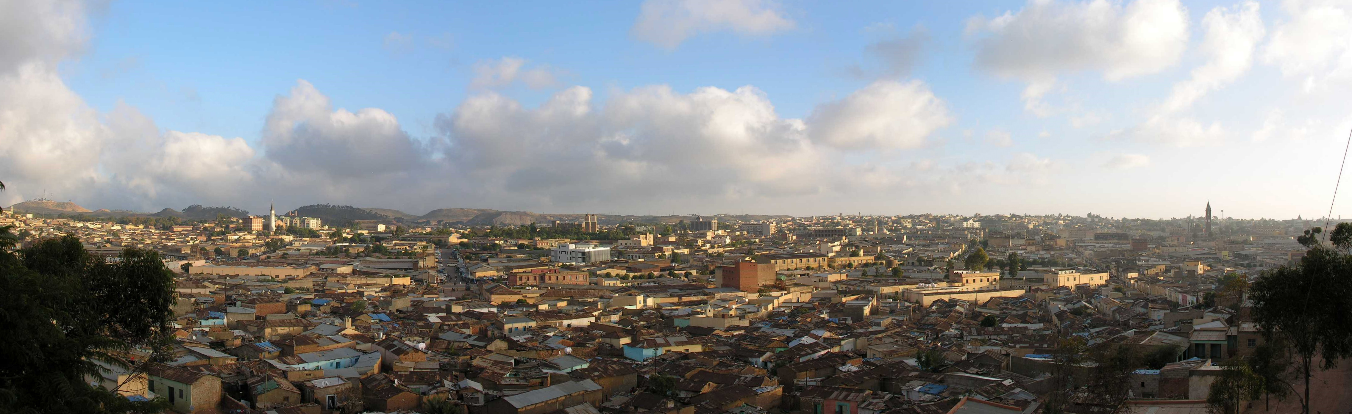 Asmara